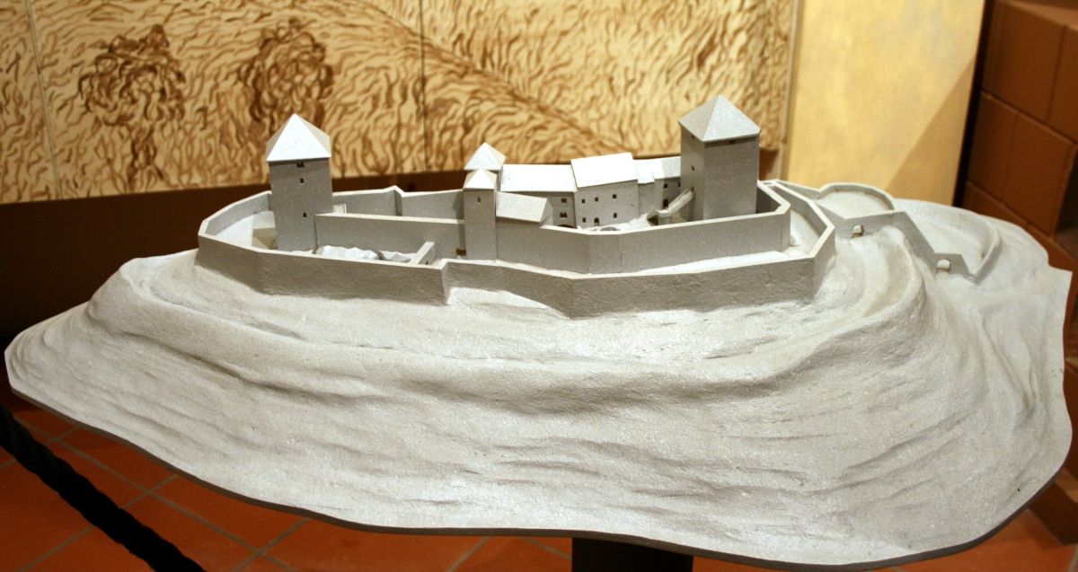 Maketa Medvedgrada , u Muzeju grada Zagreba snimljen tijekom Noći muzeja